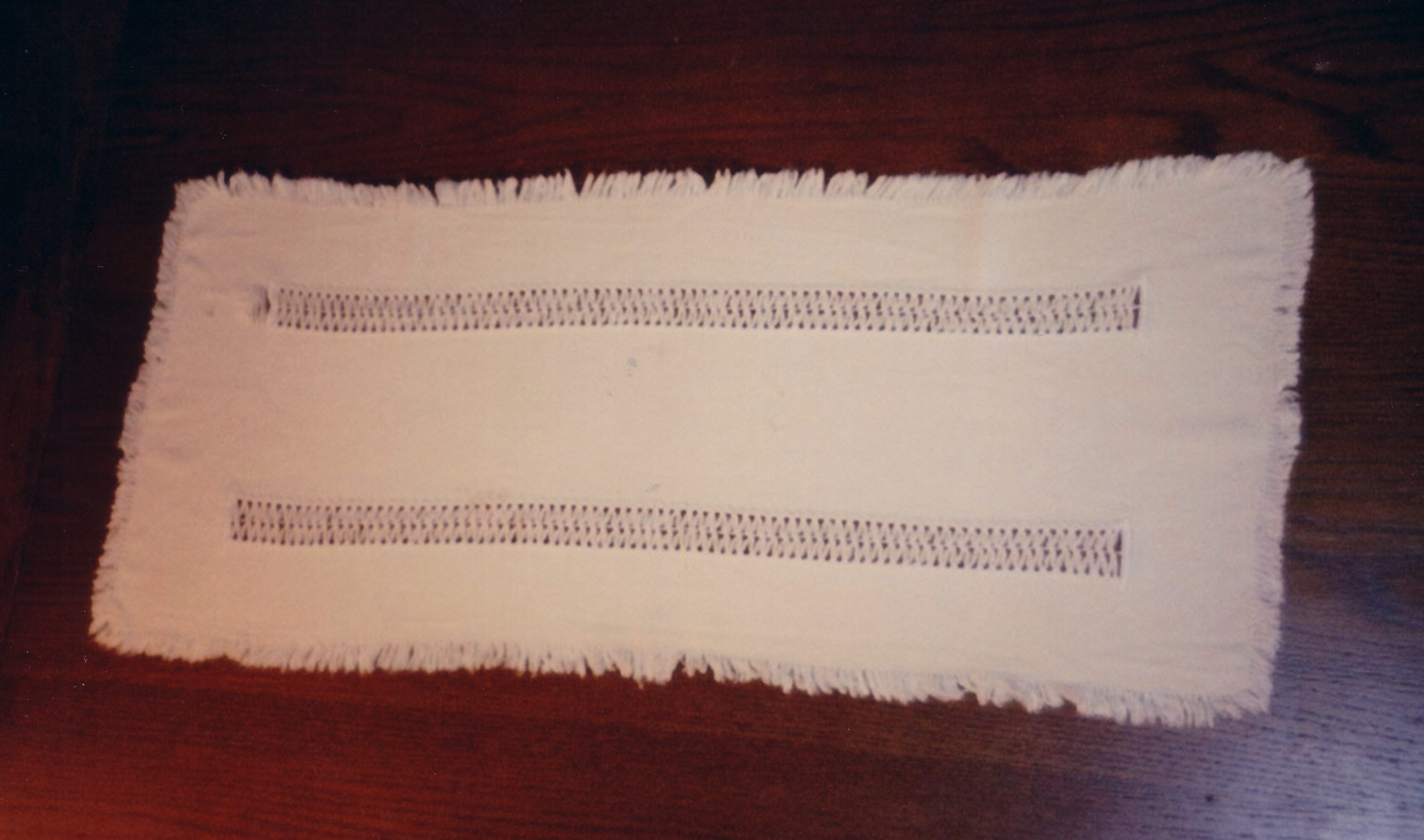 Tischläufer, Modell aus der DDR, Anfang der 1970er oder Ende 1960er Jahre